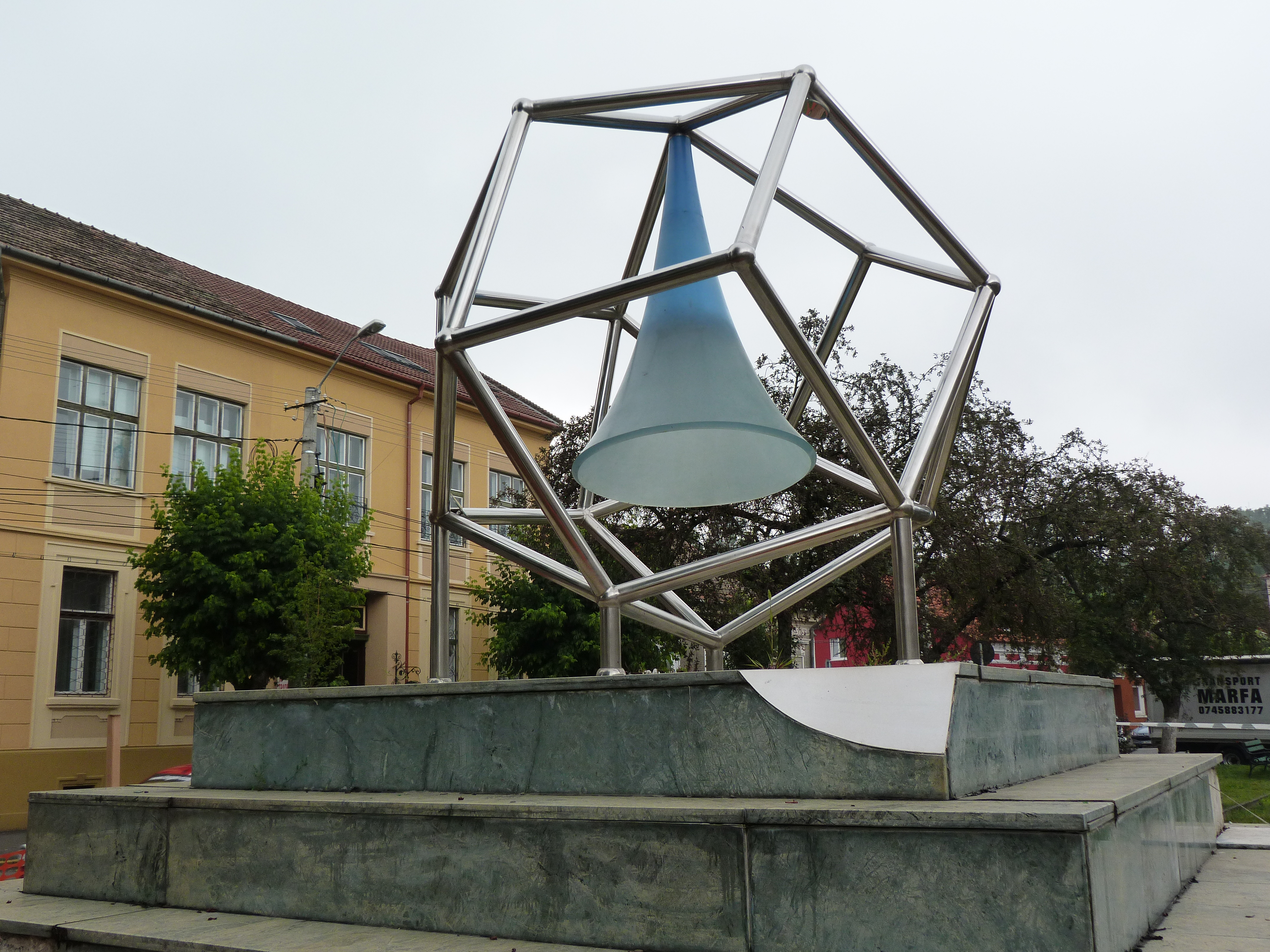 A felvétel 2013. július 12 -én pénteken készült Marosvásárhelyen. A marosvásárhelyi Bolyai téren áll a matematika szobra, mely Bolyai János matematikusnak állít emléket. Ez a világ legelső emlékműve, ami a matematikának állít emléket. Az emlékművet 2002 december 15 .én, Bolyai János születésének 200. Évfordulójára A szobor tervezője Horváth Sándor matematikus. A rozsdamentes acélból készült térhálós szerkezetben egy kék színű műgyanta harang. A harang felülete egy állandó negatív görbületű forgásfelület, amelyen érvényesül a Bolyai által megalkotott hiperbolikus geometria. ©© Published under Creative Commons in the Metapolisz DVD line. All of the photos and vids in the Metapolisz DVD line are under Creative Commons and can be used even for commercial – for profit – purposes. Recommended Citation Derzsi Elekes Andor: Metapolisz DVD line